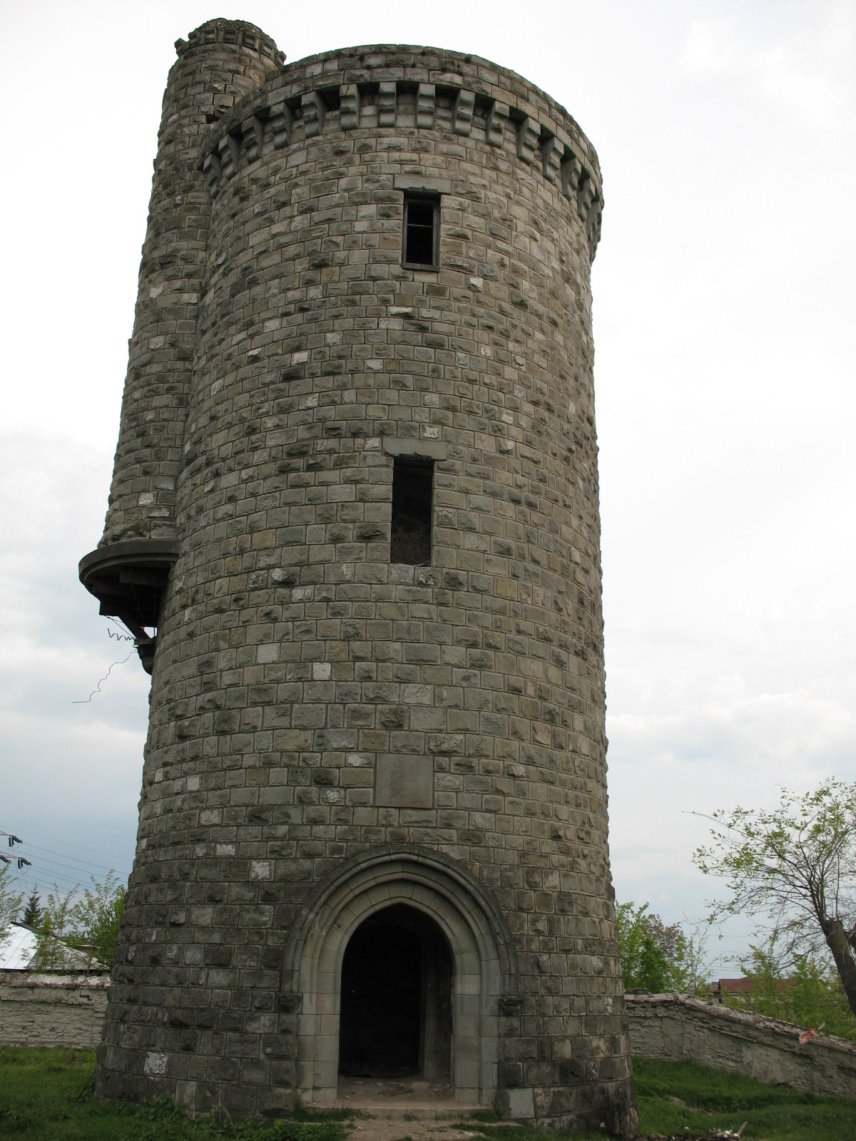 Palatul Cantacuzino Florești - Turnul de apa